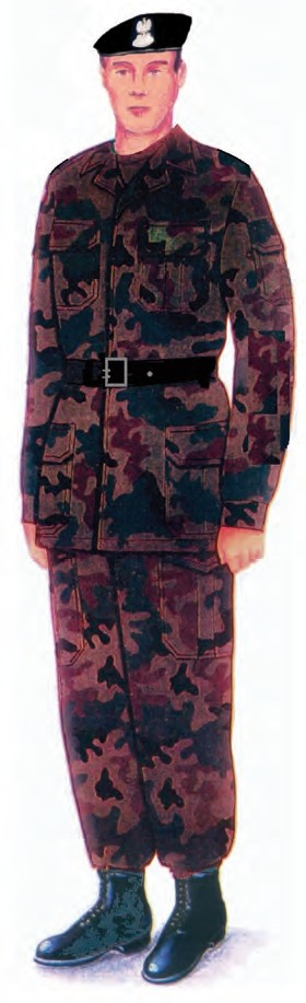 Ubiór polowy funkcjonariuszy noszących umundurowanie Marynarki Wojennej z mundurem polowym oraz z beretem koloru czarnego